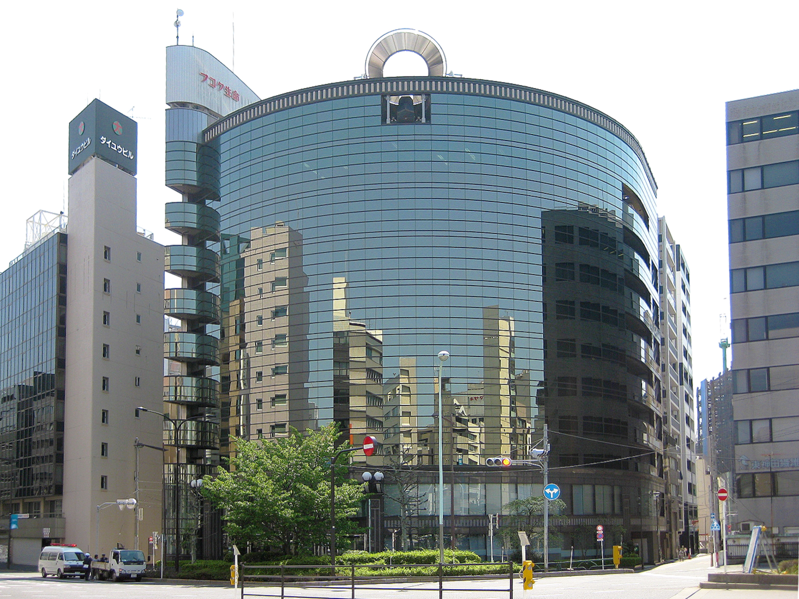 東神田フコク生命ビル （東京都千代田区）